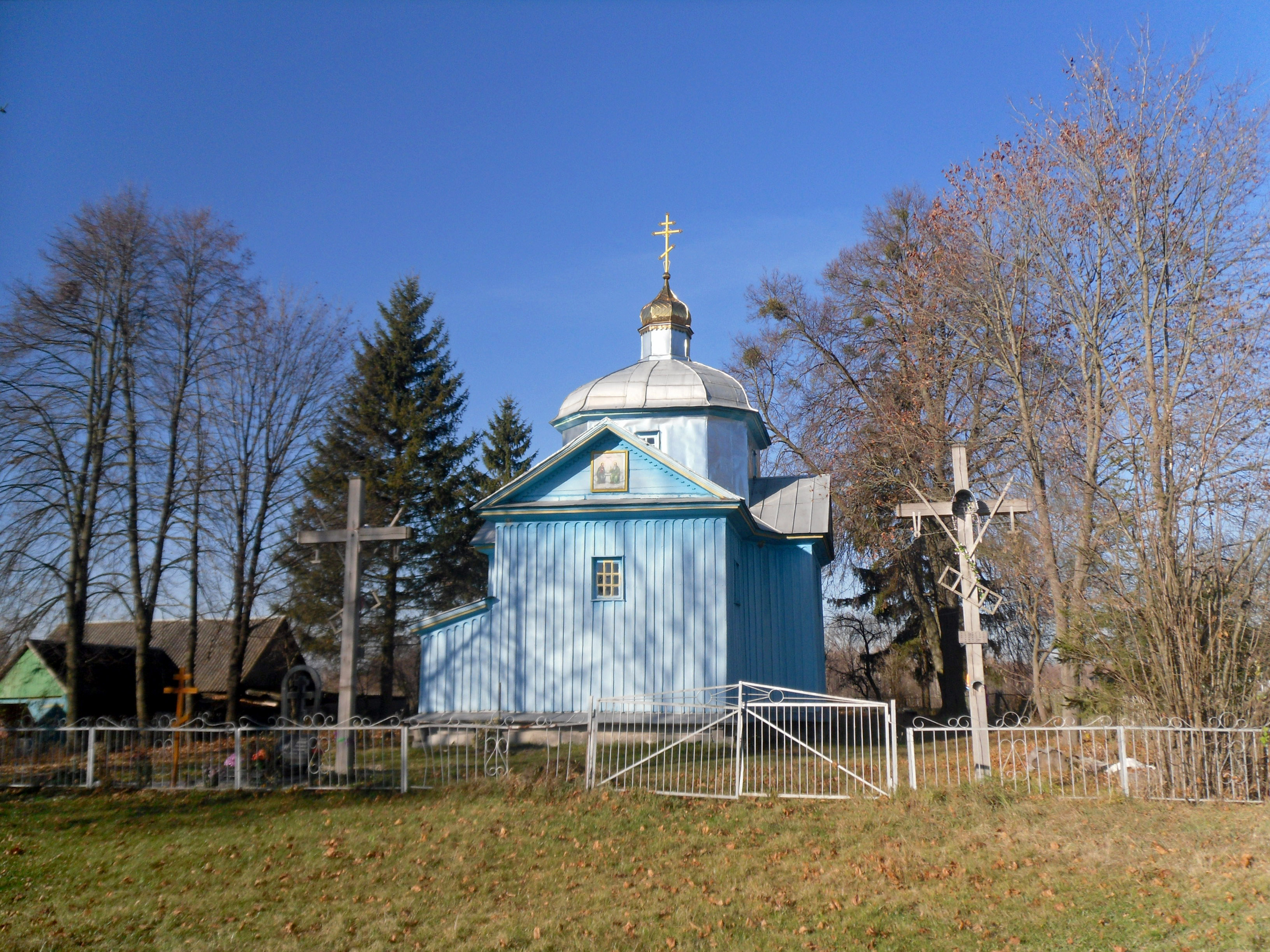 Троїцька церква, с. Монастирок, вул. Центральна